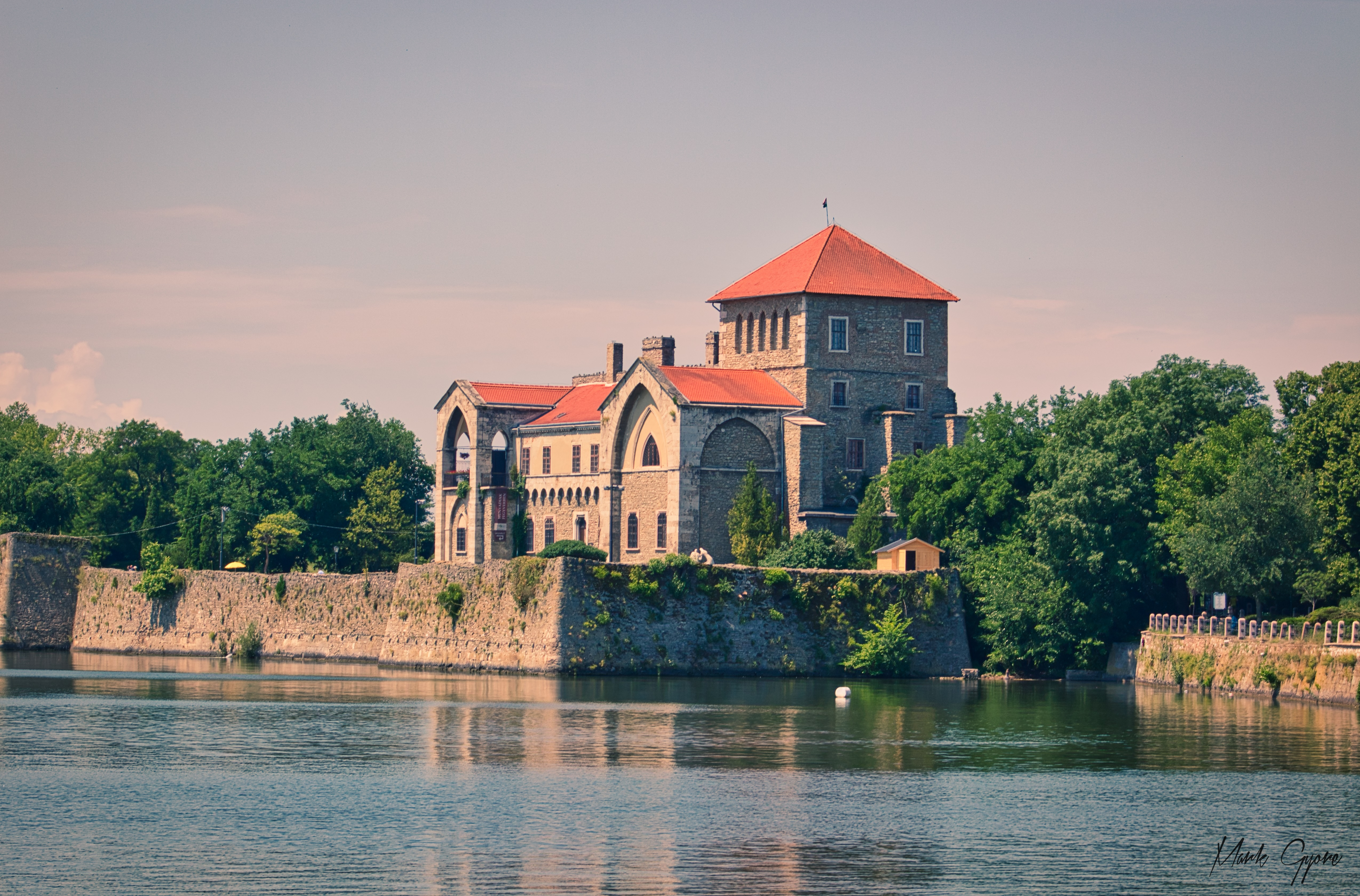 Tatai vár látkép